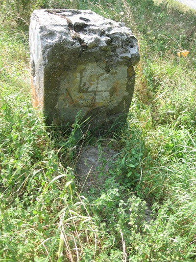 Jedyna zachowana macewa na cmentarzu żydowskim w Wiślicy z namalowaną swastyką (widok od przodu)